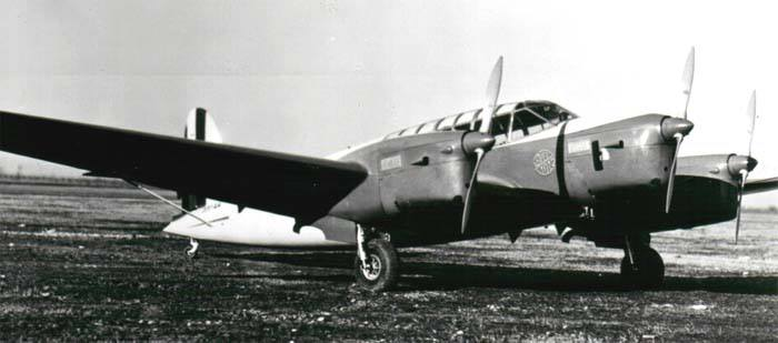 CANT Z.76 1937 dell'ing. Zappata